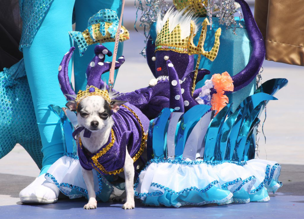 Canaval Canino del Carnaval de Las Palmas de Gran Canaria. Cloe (chihuahua) con la fantasía "Úrsula ataca a la Sirenita debajo del mar", presentada por Yaiza Quevedo Martín. Obteniendo el premio a la Originalidad 2011.